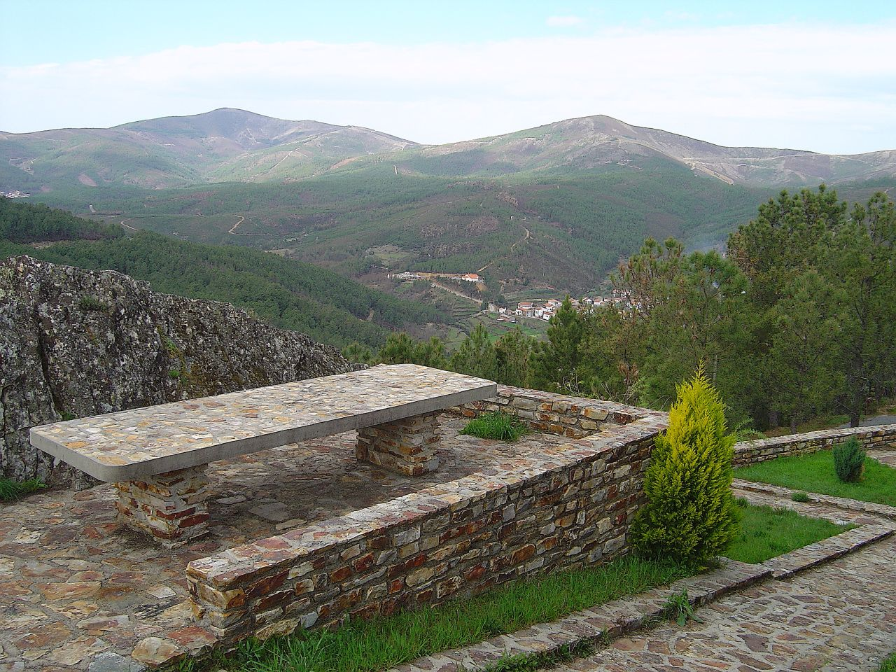 Portela de Unhais - Pampilhosa da Serra